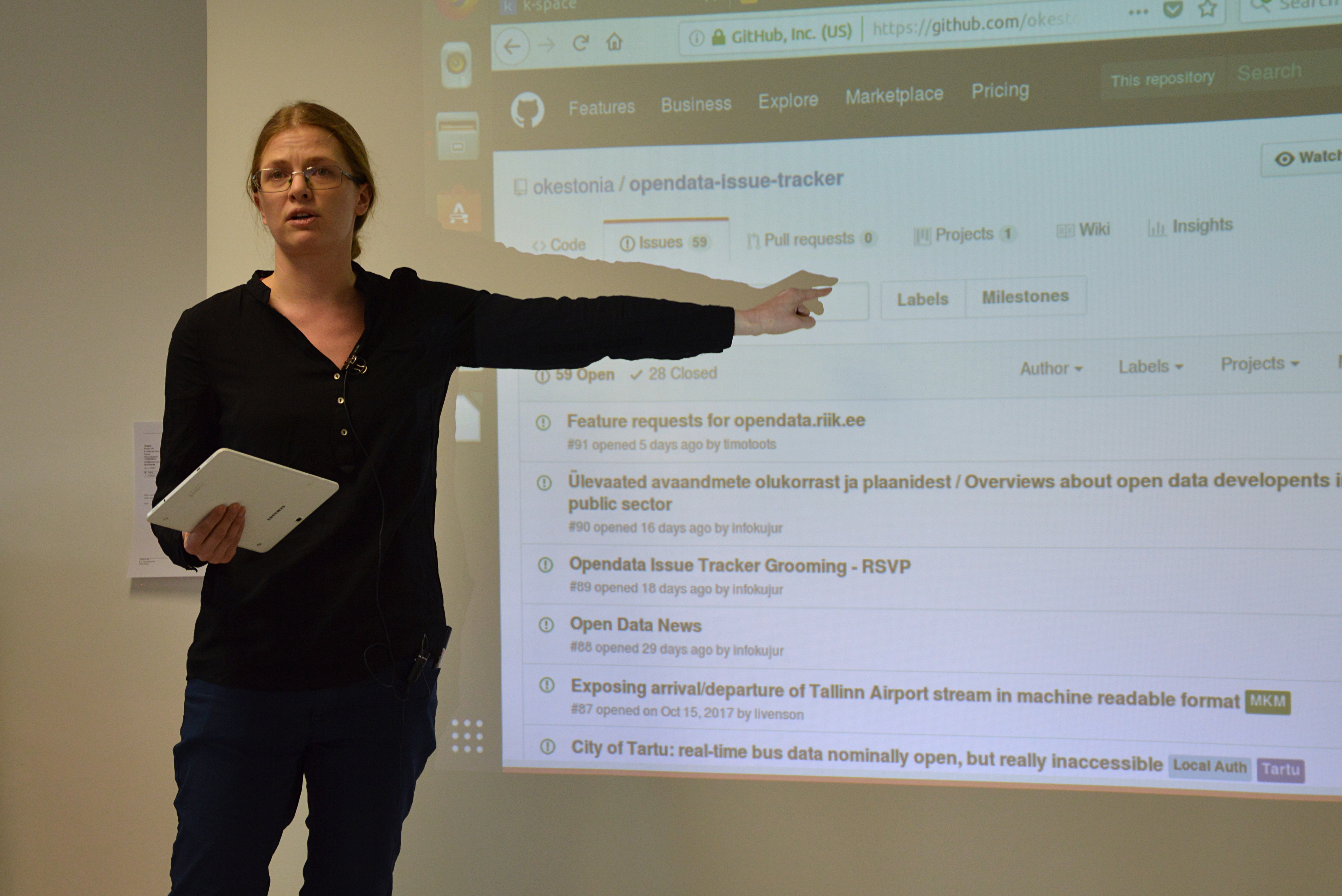 Avaandmete päev Tallinnas. Maarja-Leena Saar tutvustamas Open Knowledge plaane avaandmete kasutamise edendamiseks.